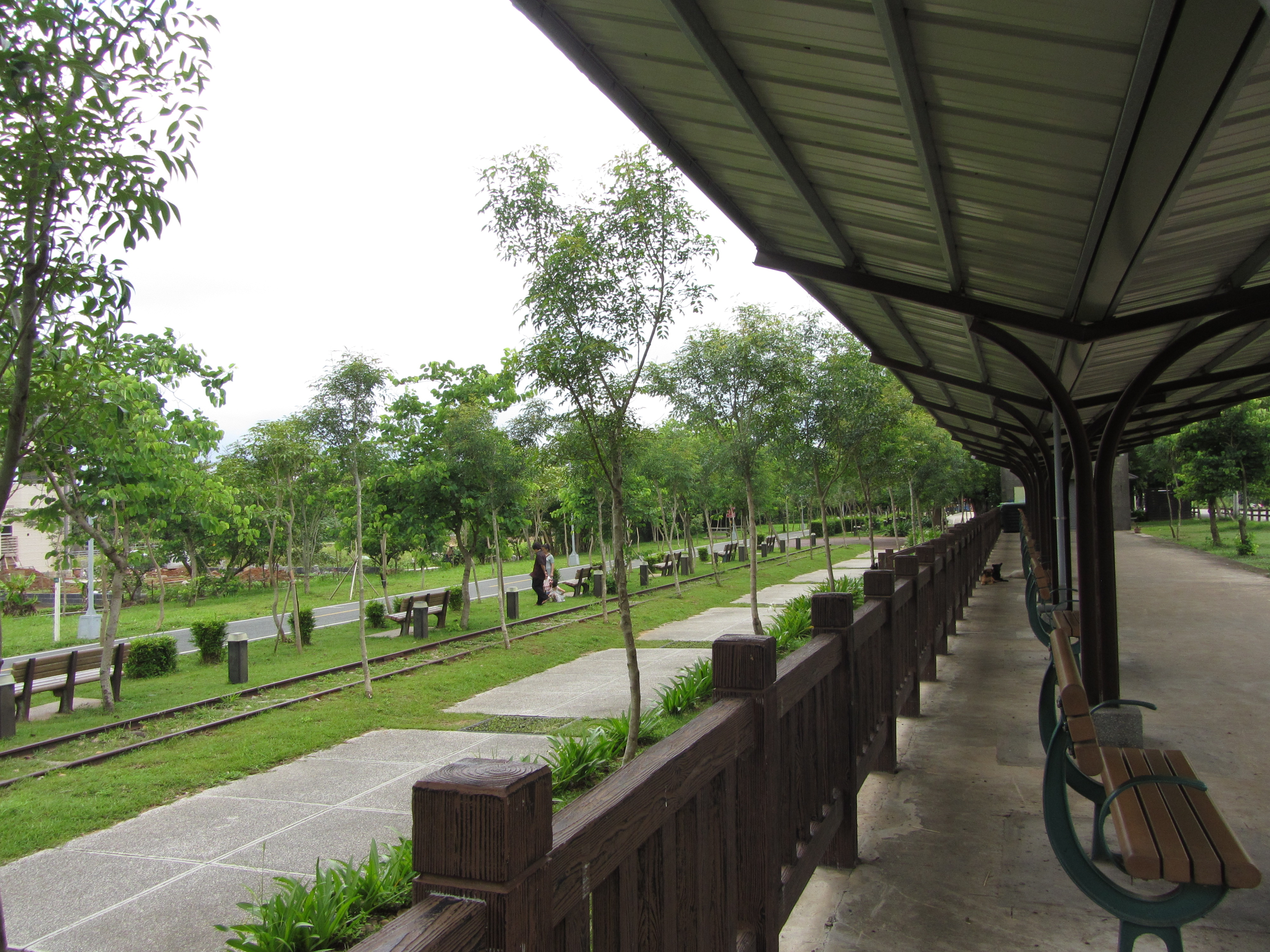 2012年的神岡車站。